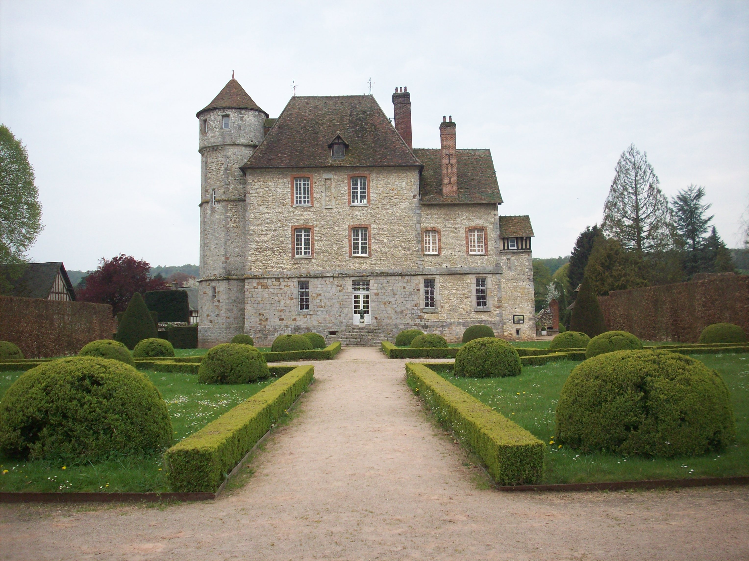 Château de Vascœuil depuis les jardins.